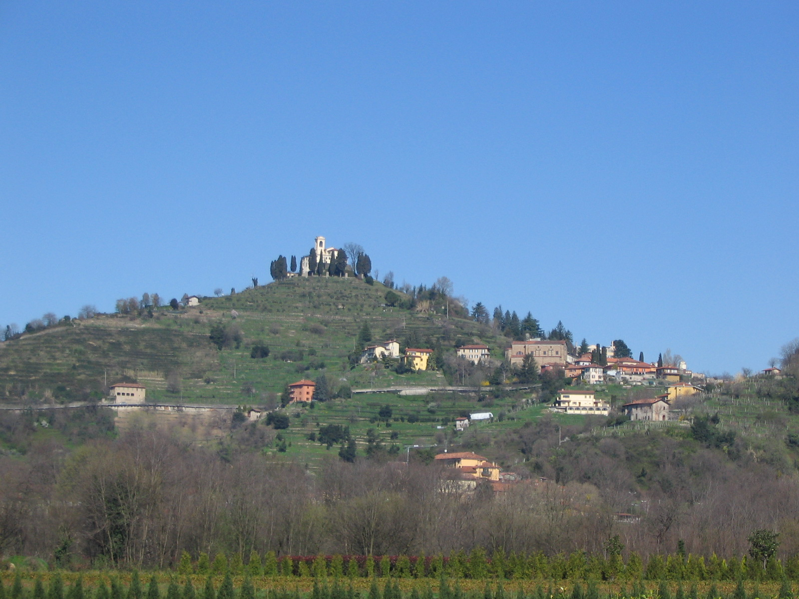 Autore Giorces. Montevecchia, Lecco.